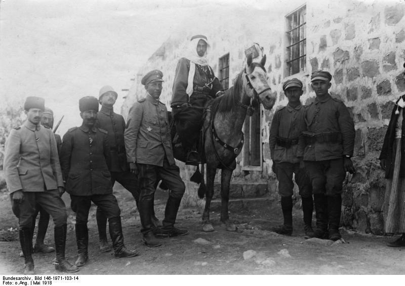 Beduinen Scheich Jussuf Ul Ursan, der deutsche Hauptmann Justin (links davon) und türkische Offiziere (links) Jordan-Tal, Mai 1918